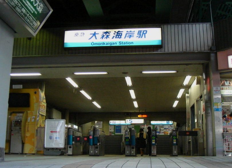 京急本線ja:大森海岸駅改札口 投稿者↑PON（ウエポン）が2007年1月8日に駅前から撮影 一部編集の上で2007年1月16日に投稿